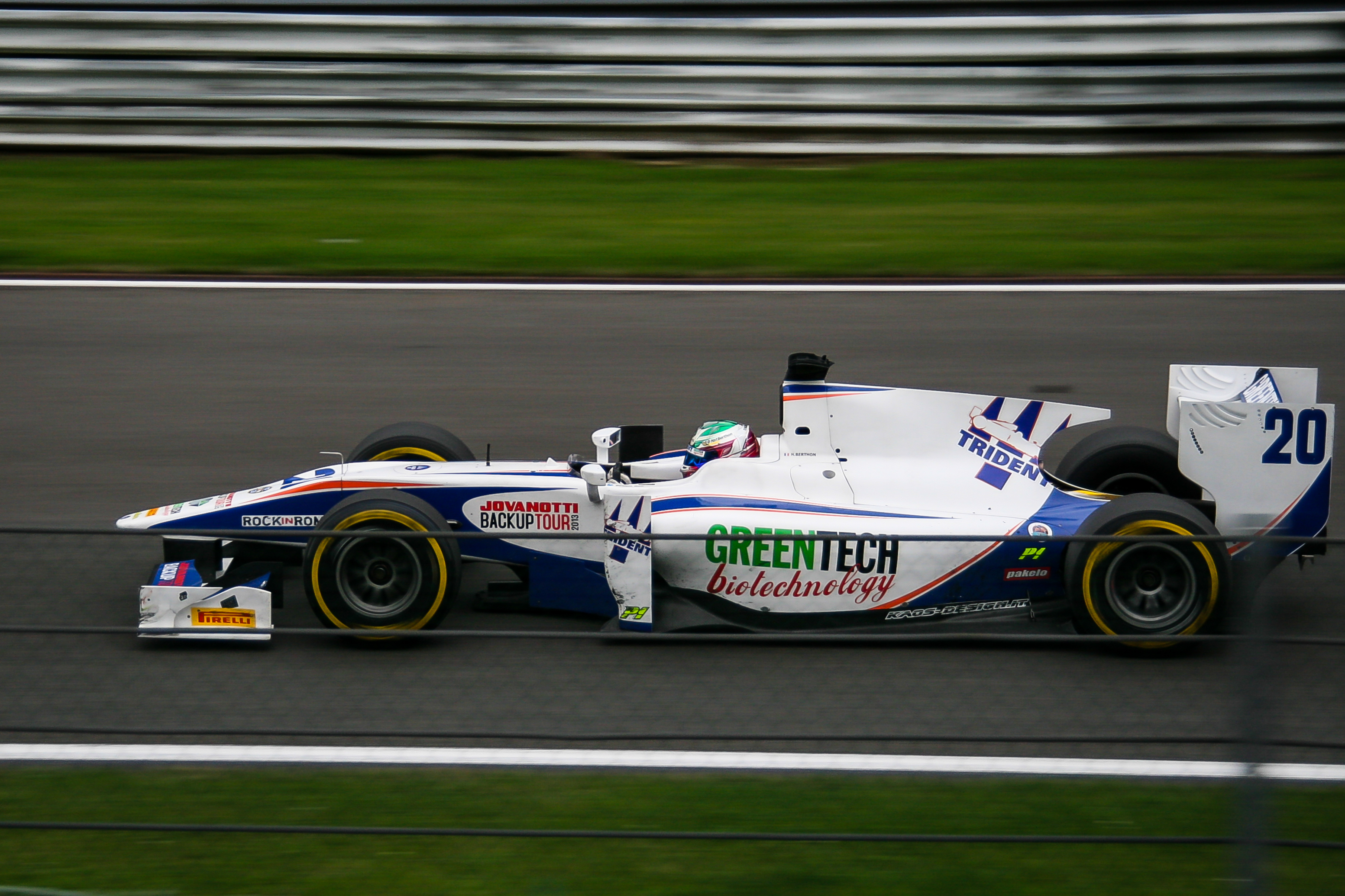 Nathanaël Berthon beim Hauptrennen im Belgien 2013